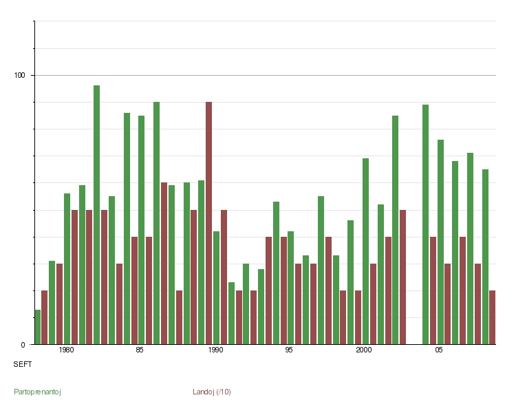 Evoluo de la partoprenantaro ĉe la aranĝo Somera Esperantista Familia/Feria Tendaro de 1978 ĝis 2008 (de) Teilnehmerentwicklung beim SEFT von 1978 bis 2008 Kategorio:Statistiko de Esperantujo